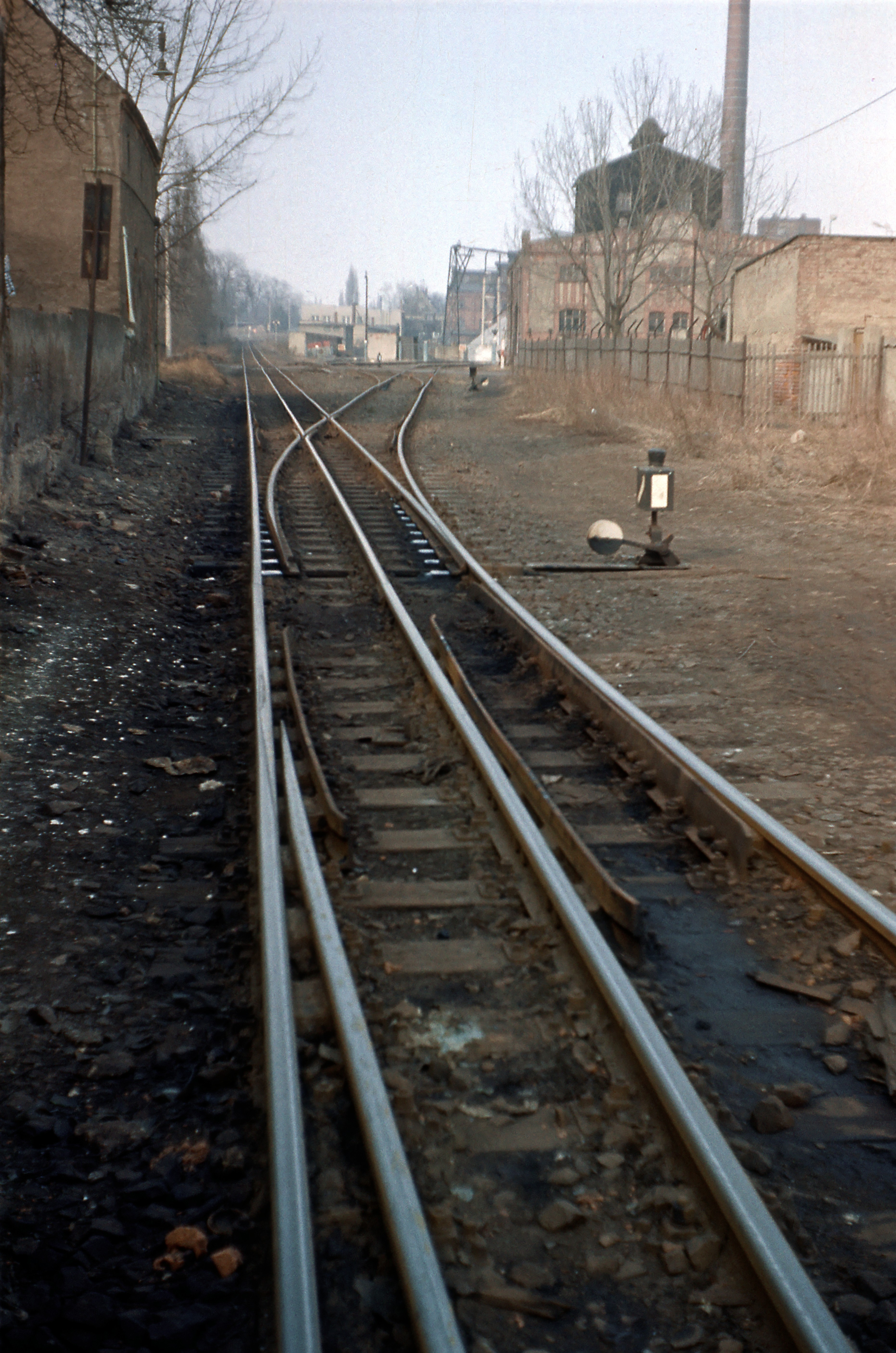 Das im Vordergrund herausgeführte Regelspurgleis ist das Ausziehgleis für den Anschluss Zuckerfabrik, im Dreischienengleis ist ein wirksamer Gleisabschluss für nur eine von beiden Spurweiten profilbedingt nicht möglich. Durch die Radlenker auf den Innen- und zusätzlich auf den Außenseiten der Fahrschienen ist die Zusammenführung beider Spurweiten ohne bewegliche Teile möglich.